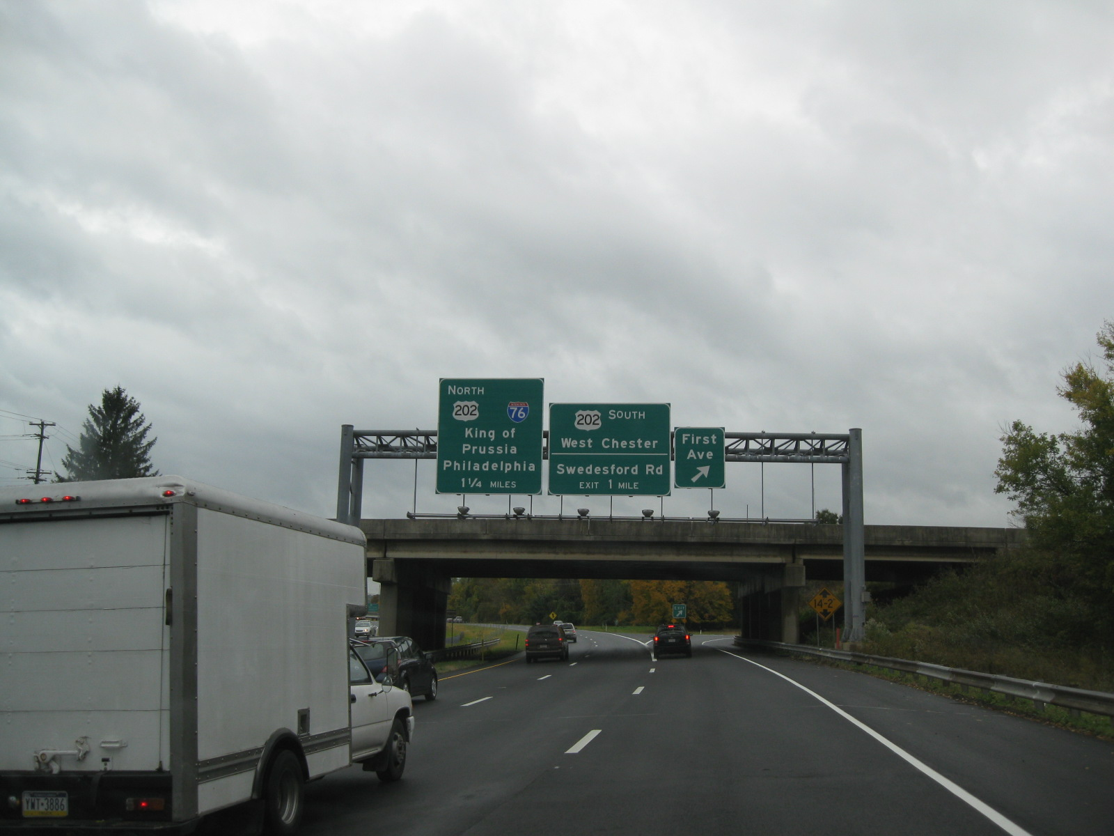 US Route 422 - Pennsylvania